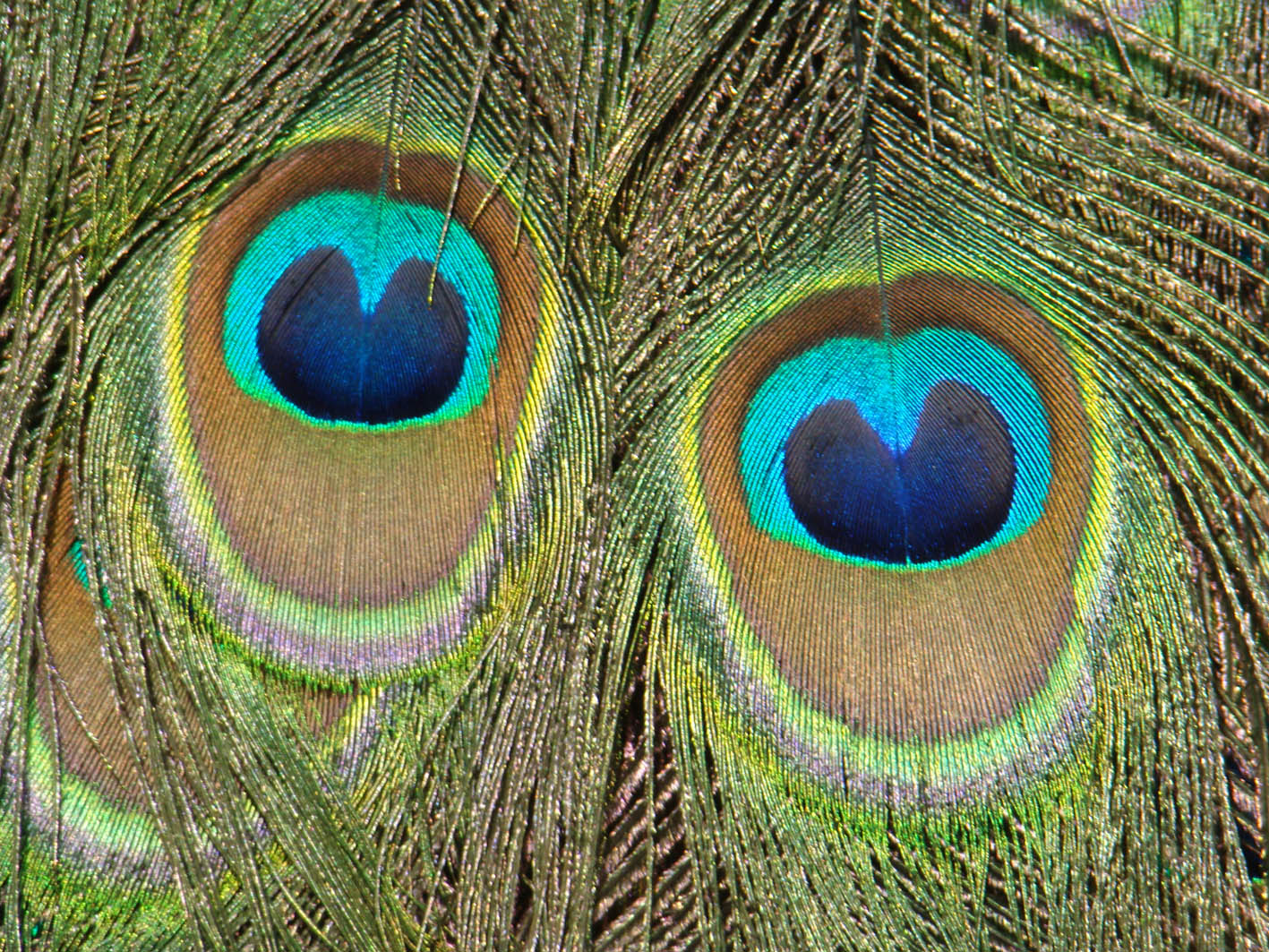 Un pavo real con su cola extendida en el parque de Valladolid Campo Grande. Detalle del dibujo de las plumas.